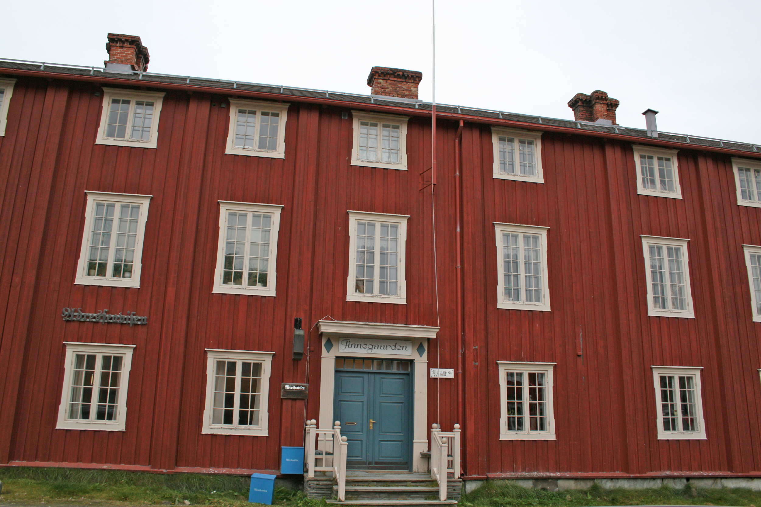 Med dette huset begynner de store, markante trebygningene i Bergmannsgata. Gården er oppkalt etter bergskriver Jens Finne, som kjøpte eiendommen i 1720-årene. : Finnegården, hus no. 13